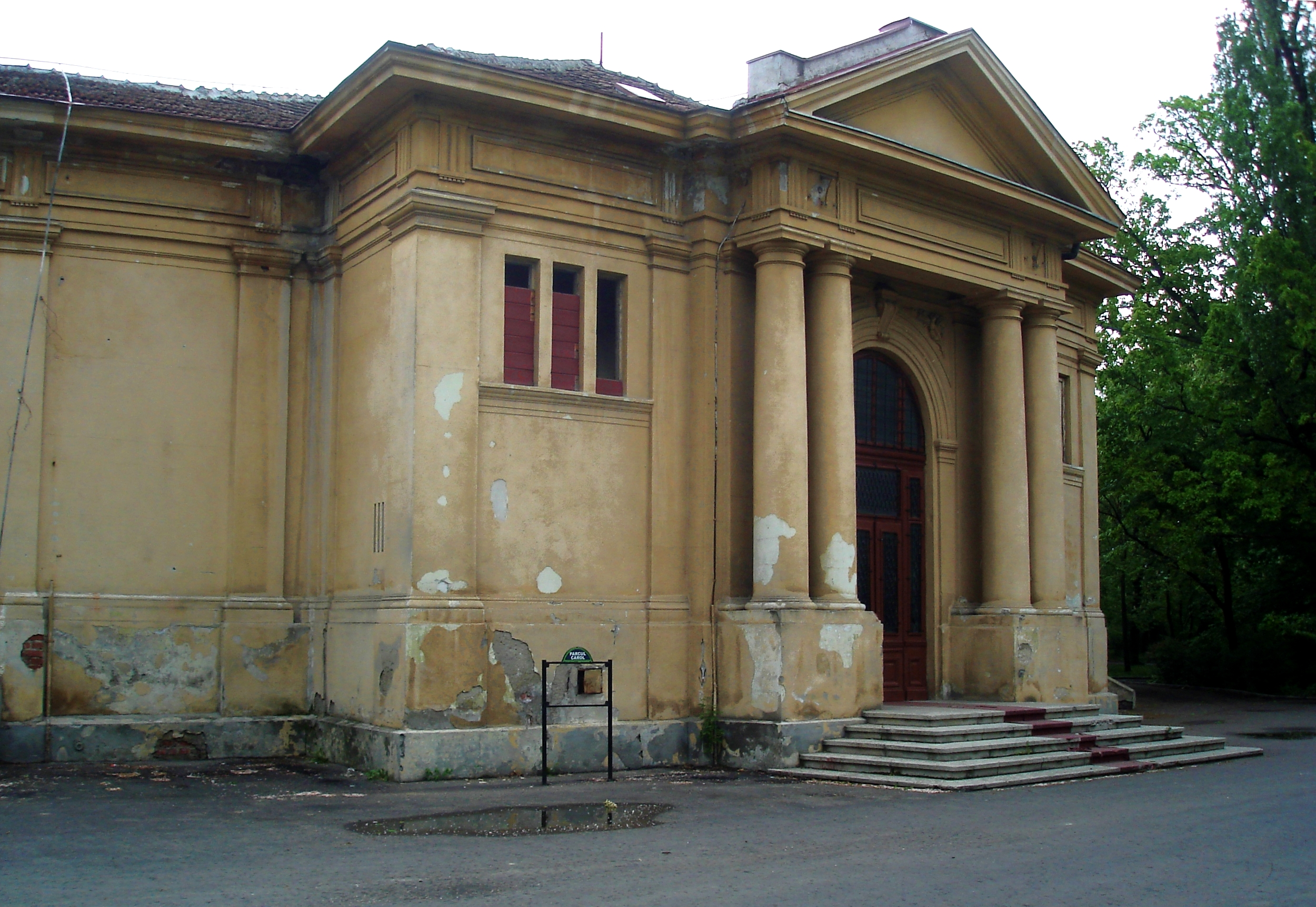 Arenele romane, Parcul Carol-București